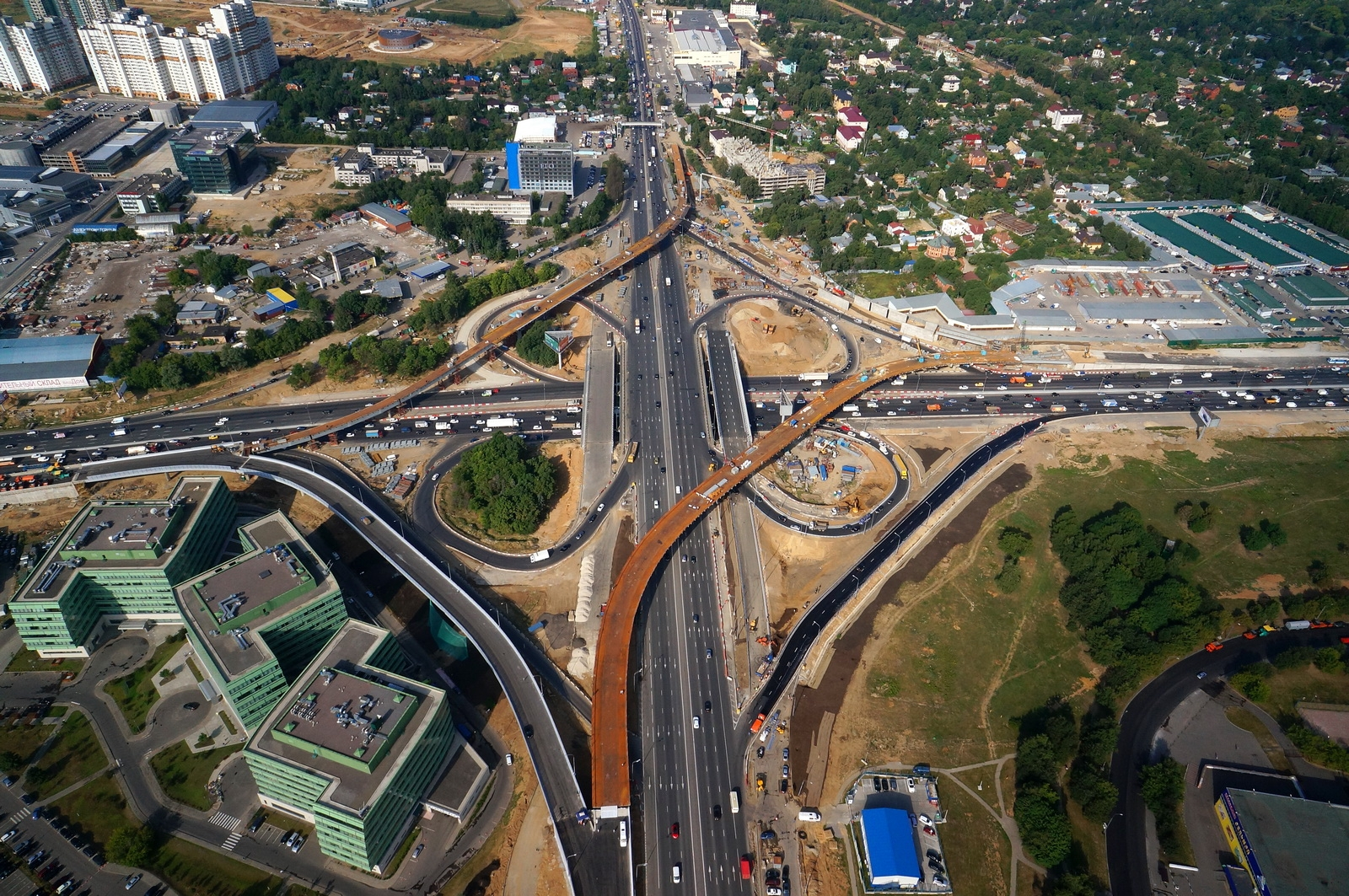 Строительство развязки МКАД с Можайским шоссе.